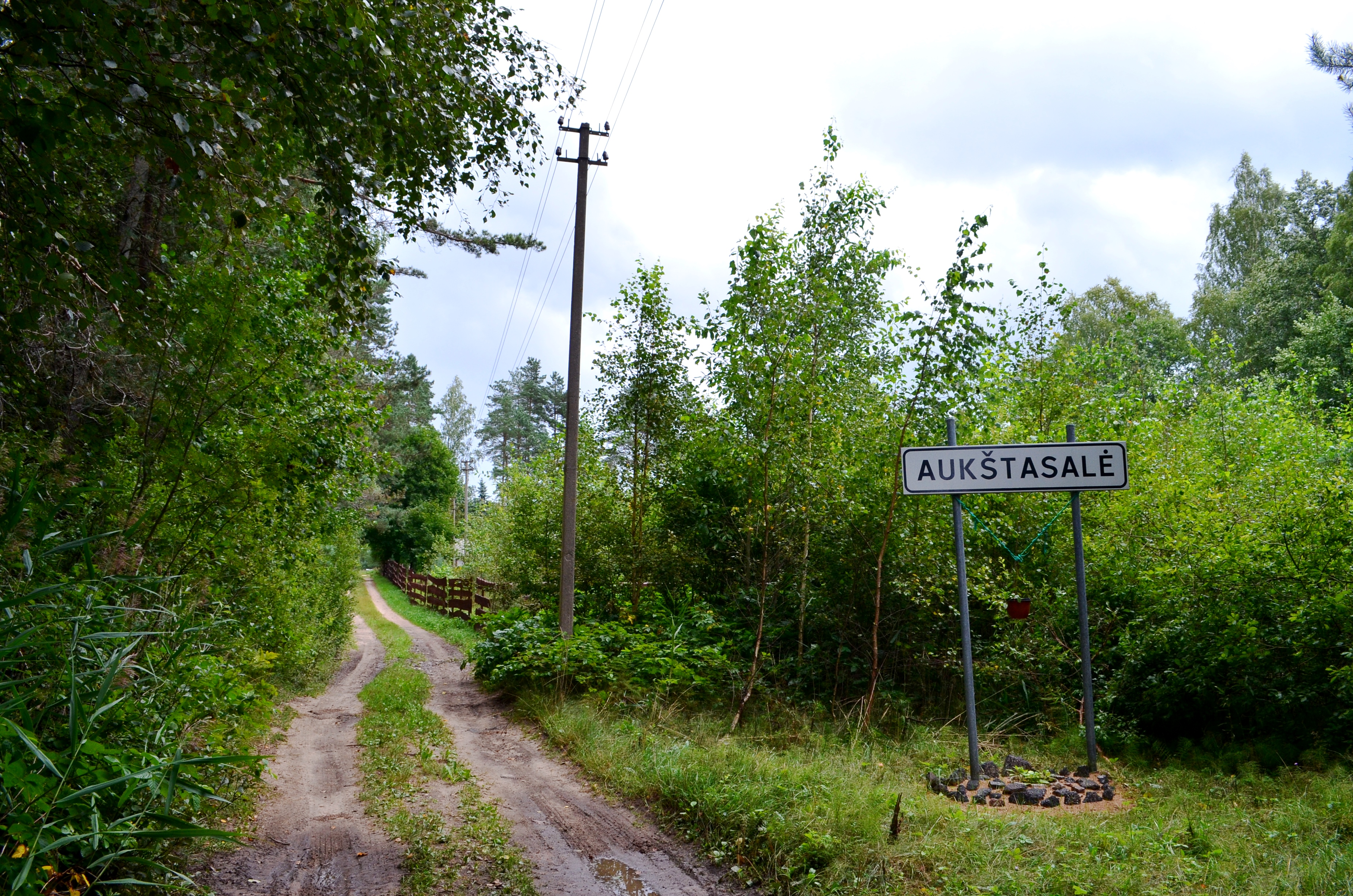 Aukštasalė, Labanoro sen., Švenčionių raj.